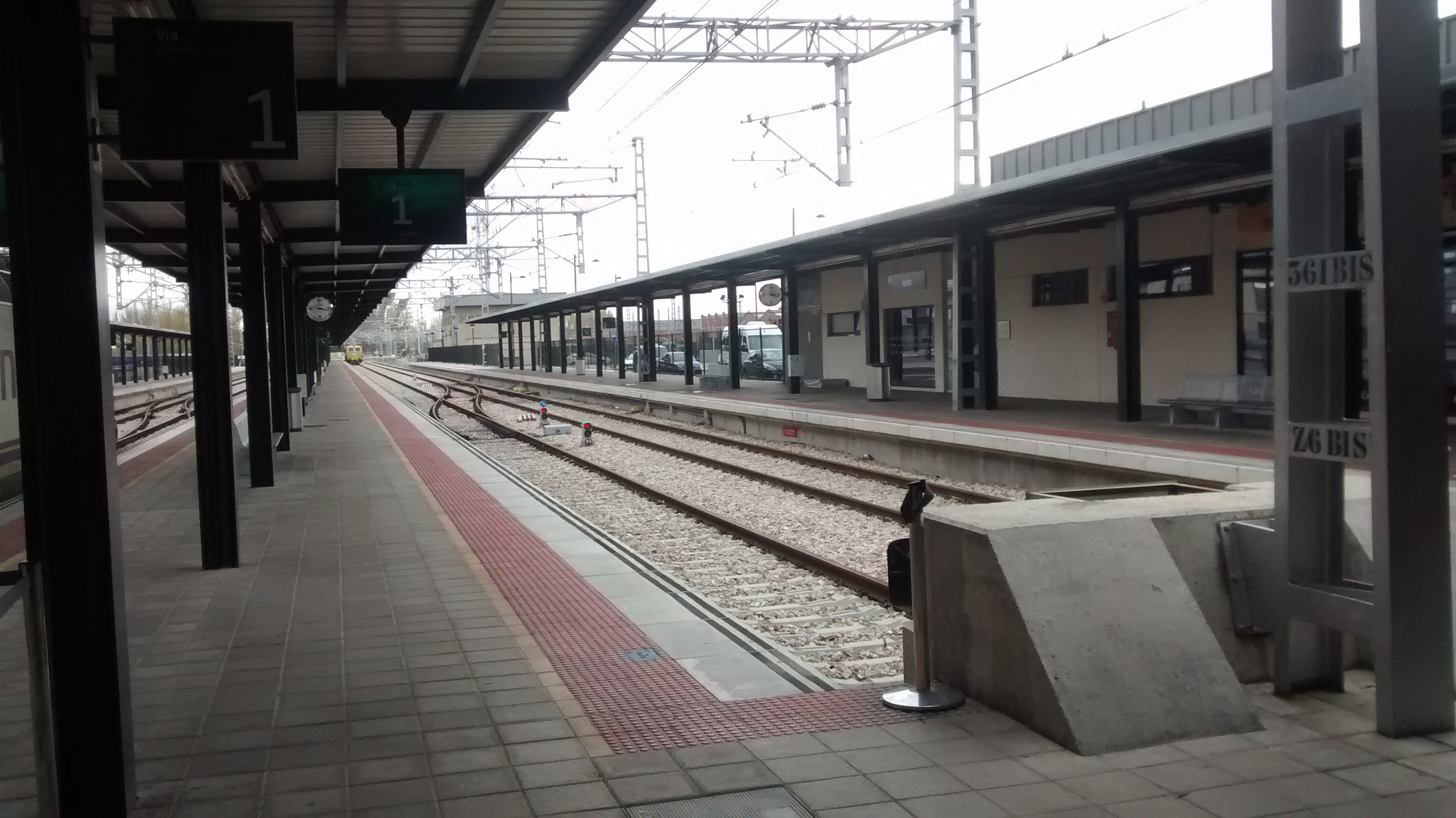 Estación provisional de ferrocarril de León andenes 2014